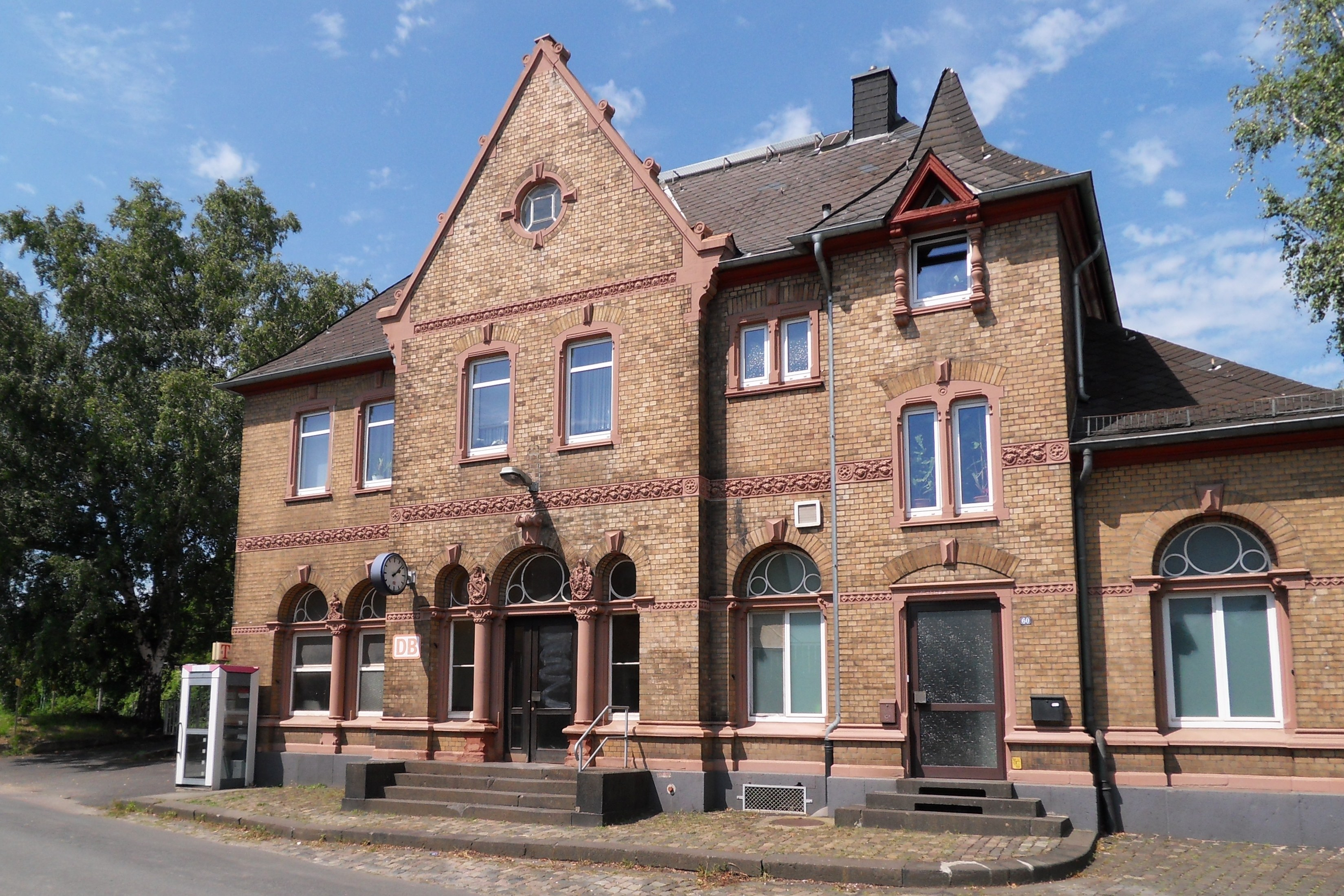 Bahnhof von Hattenheim im Rheingau an der Rechten Rheinstrecke This is a photograph of an architectural monument.